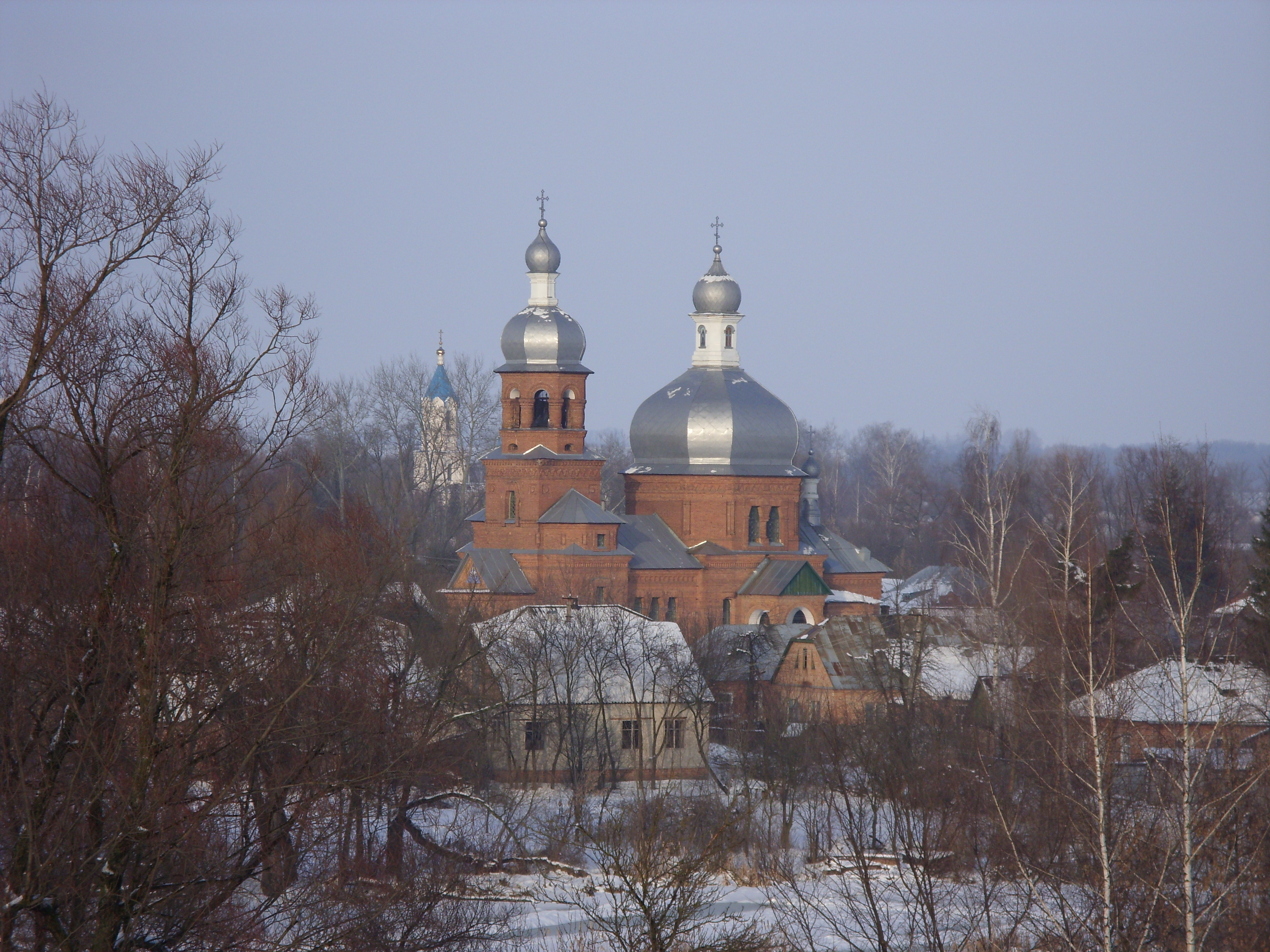 1912 р. Адреса: м. Білопілля, вул. Старосілля,25